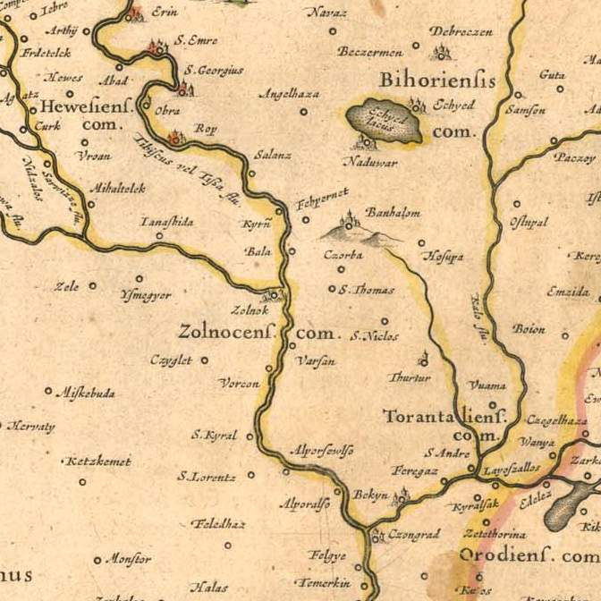 Szolnok Joan Blaeu térképén (középen).World, or a New Atlas of Maps and Representations of All Regions